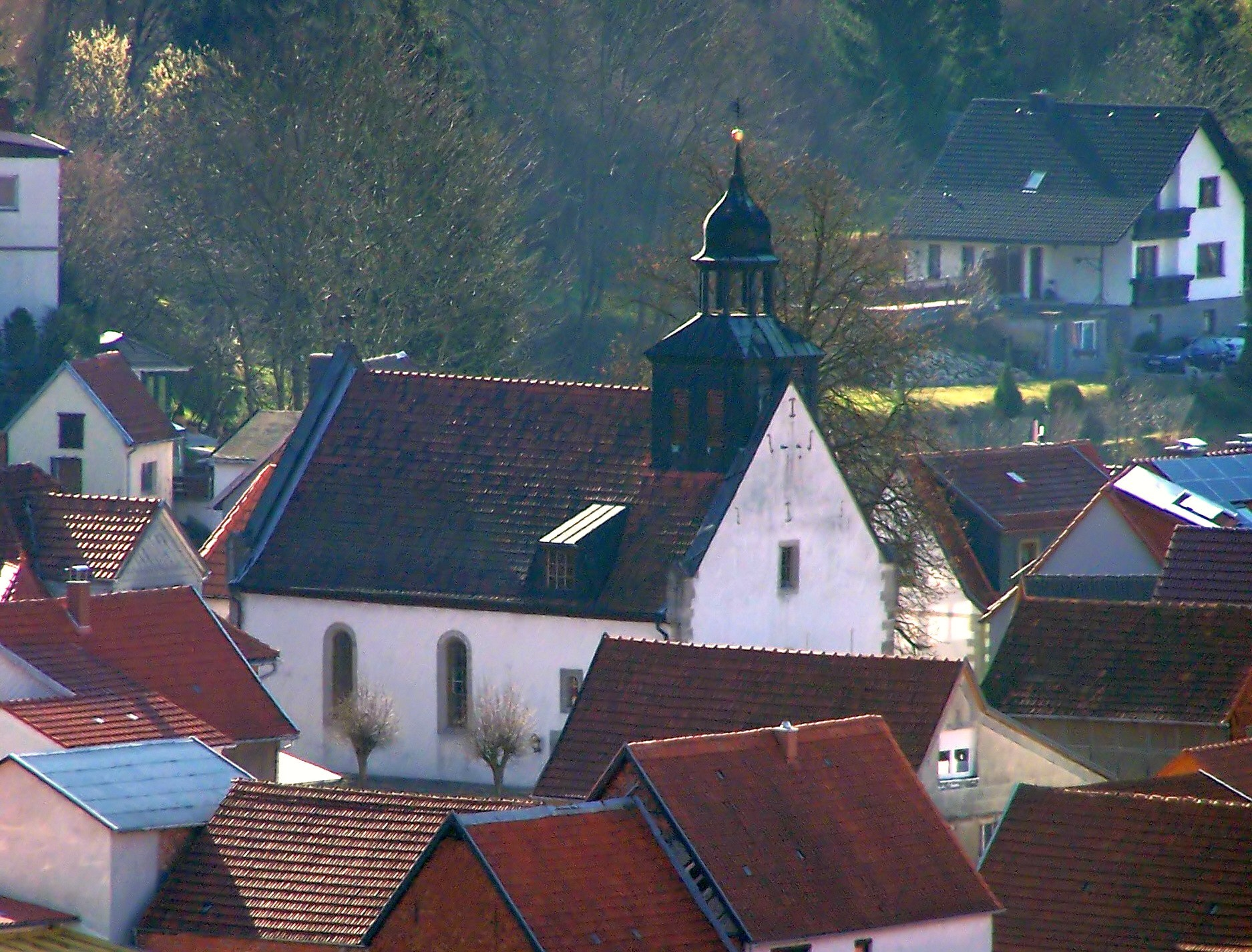 Die alte Dorfkirche St. Marien von Heyerode